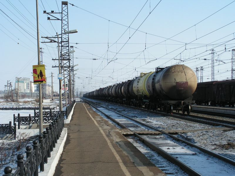 ЖД Кормиловка